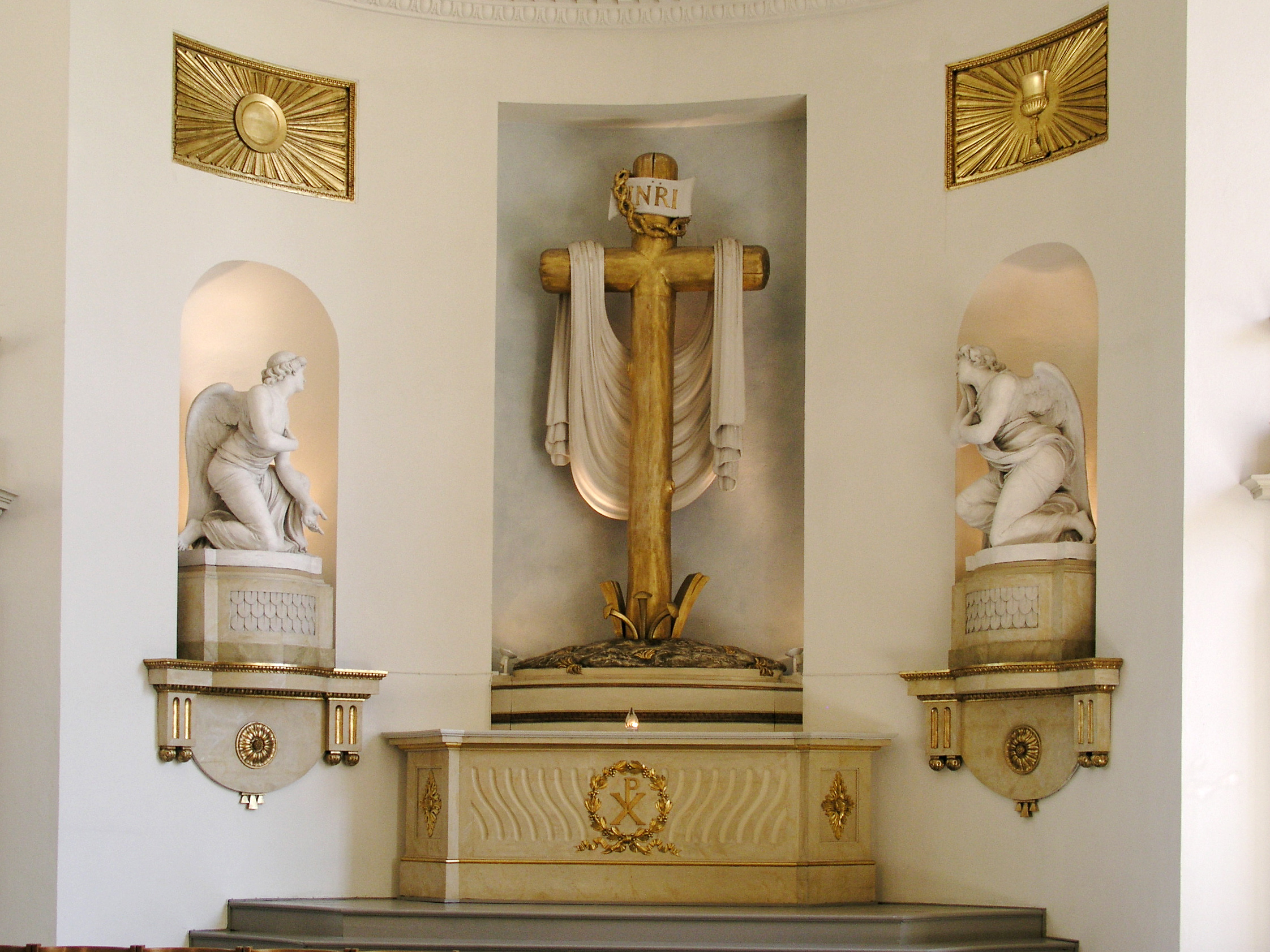 Karlstads domkyrka / Cathedral of Karlstad. Altar cross.